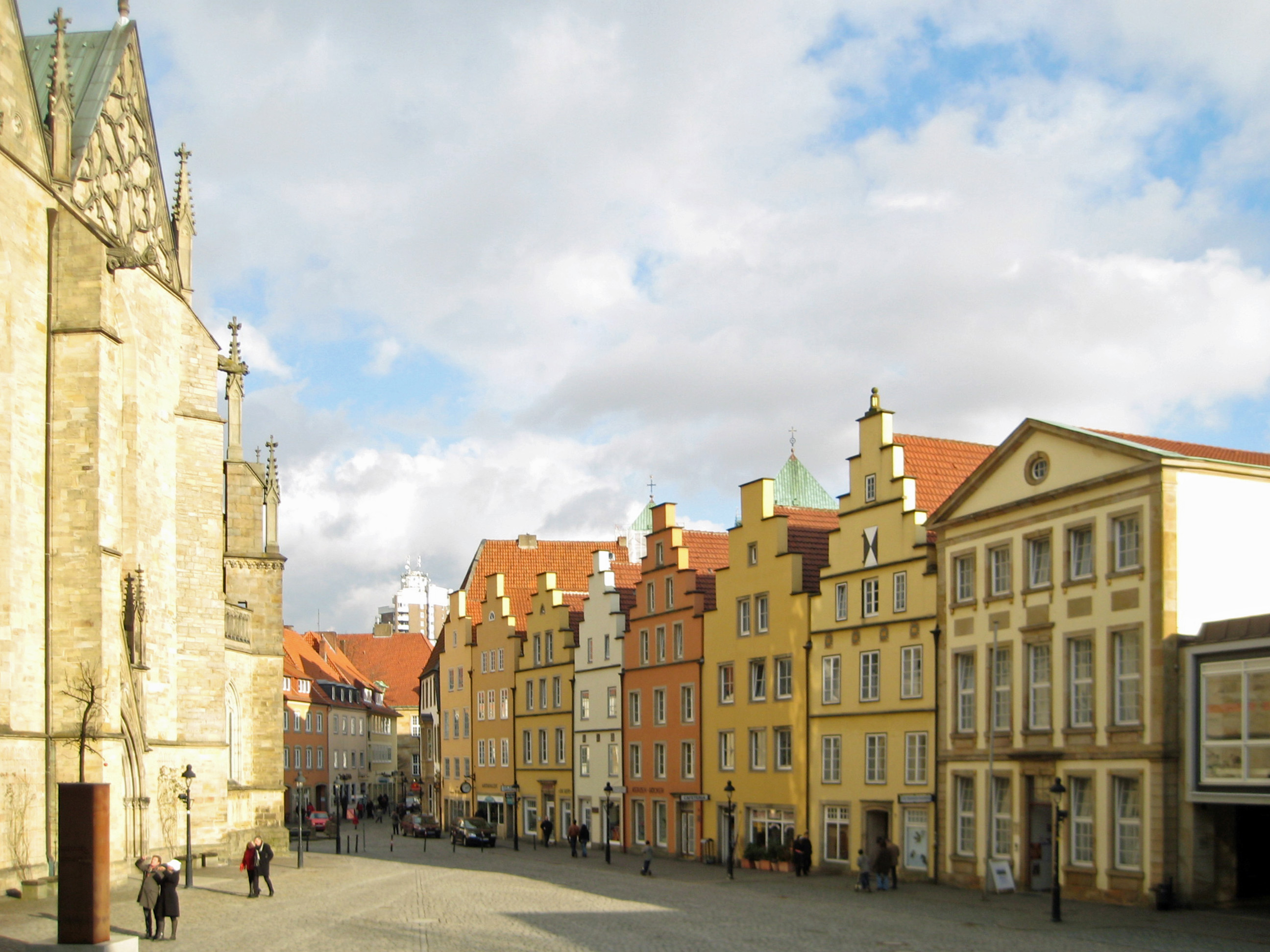 Markt in Osnabrück